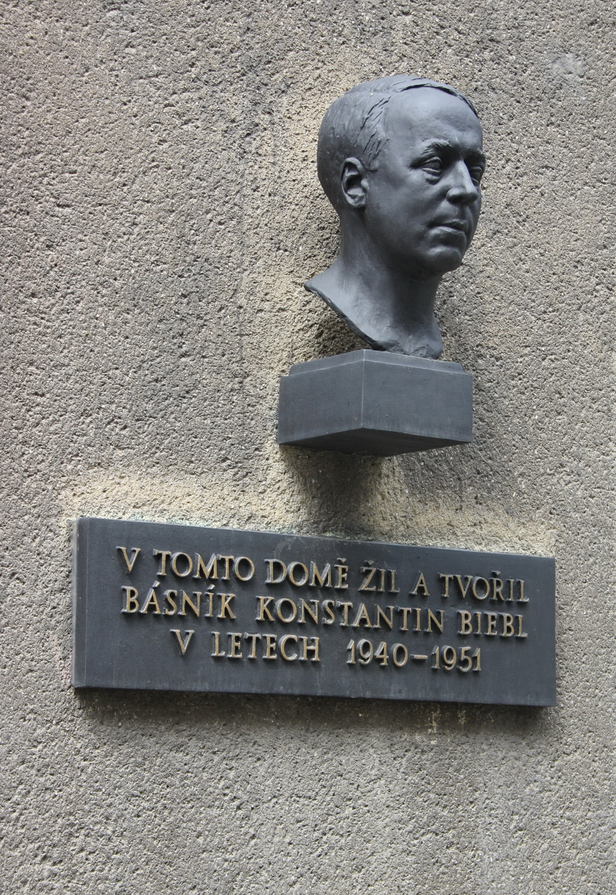 Pamětní deska básníka Konstantina Biebla na domě č.p. 401, Praha 2 - Nov Město, Na Výtoni 7